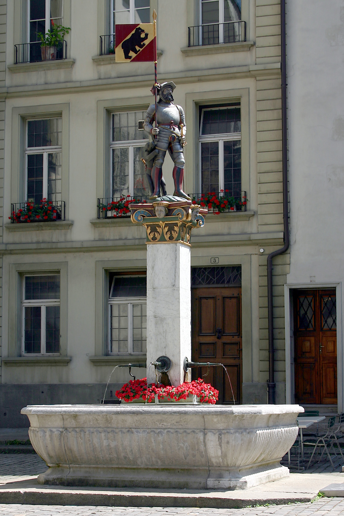 Vennerbrunnen, Bern, Switzerland